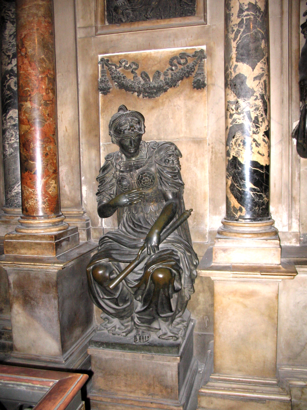 Monumento funebre di Gian Giacomo Medici